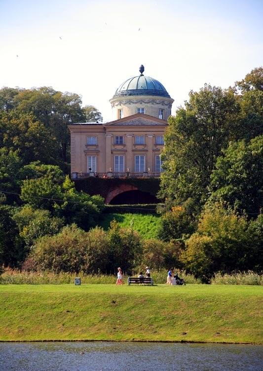 Warszawa (Polska)